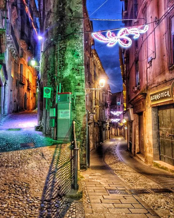 Scorcio di corso Telesio durante il periodo natalizio nel centro storico di Cosenza